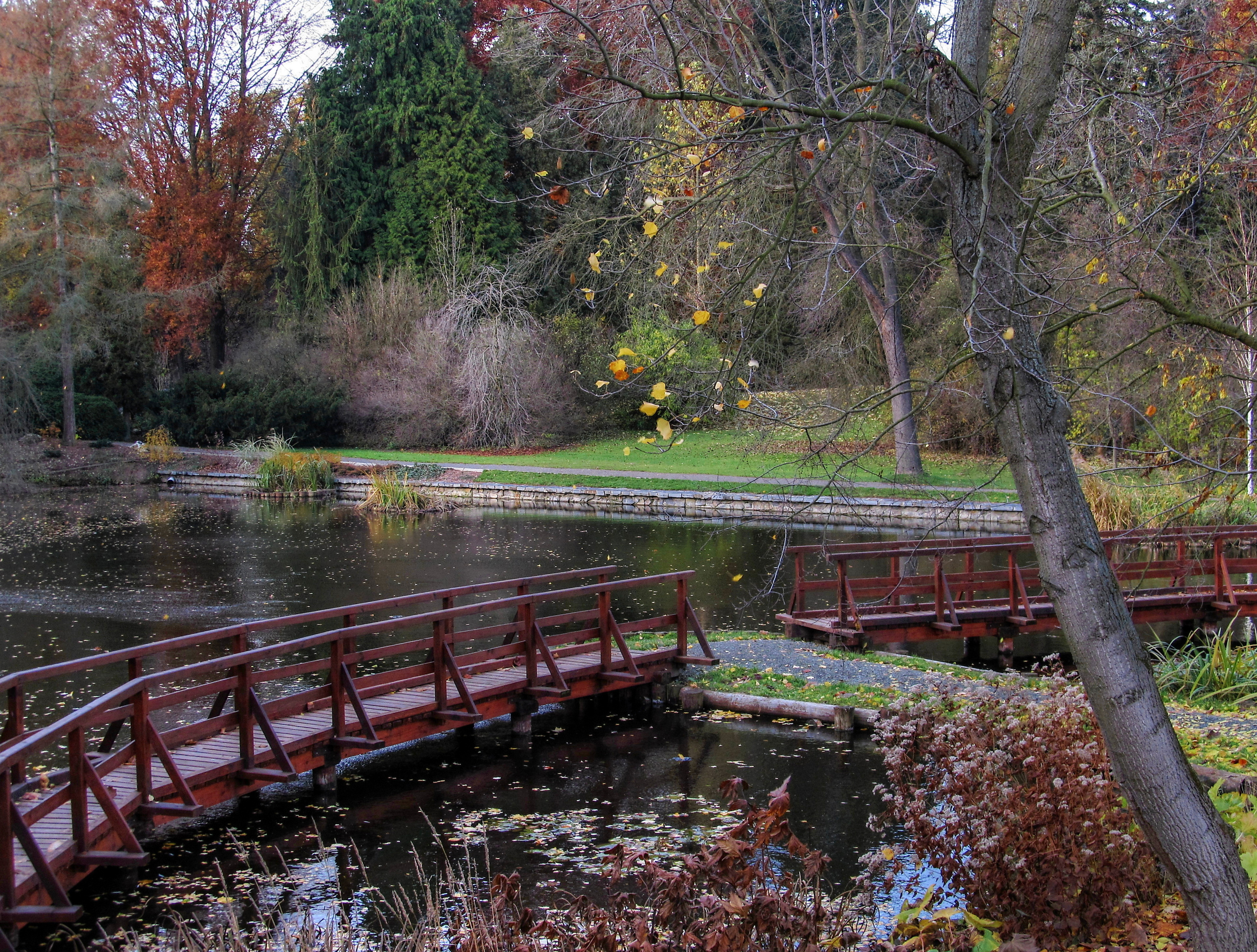 Lávky v arboretu